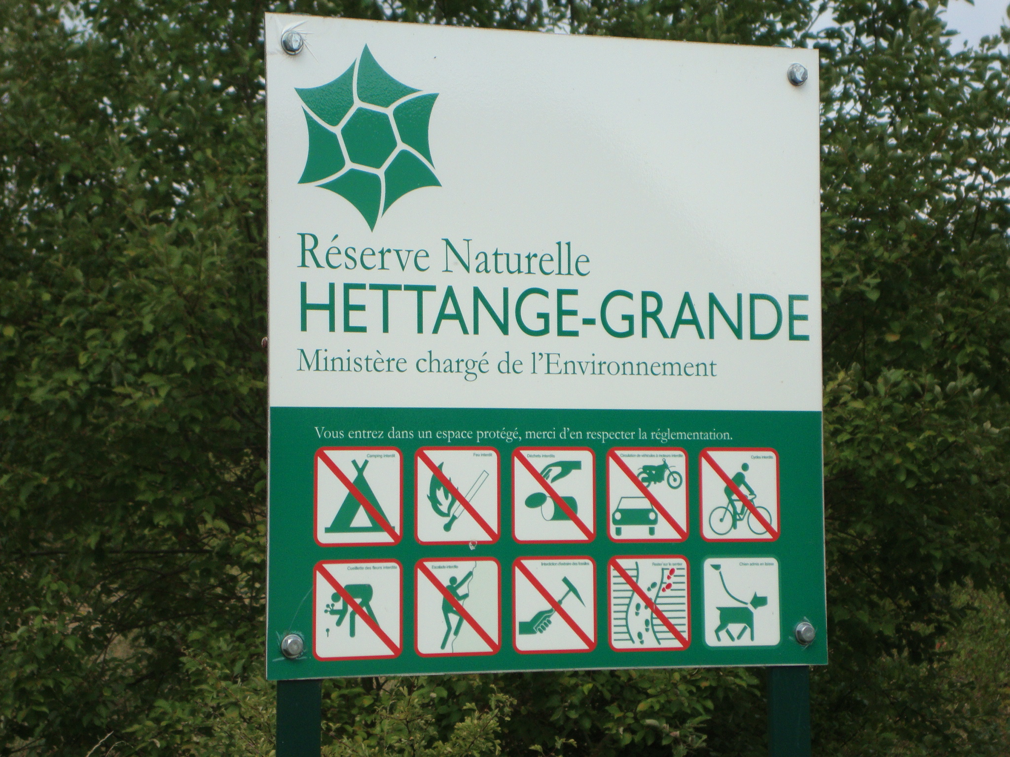 Entrée Réserve géologique - Hettange-Grande